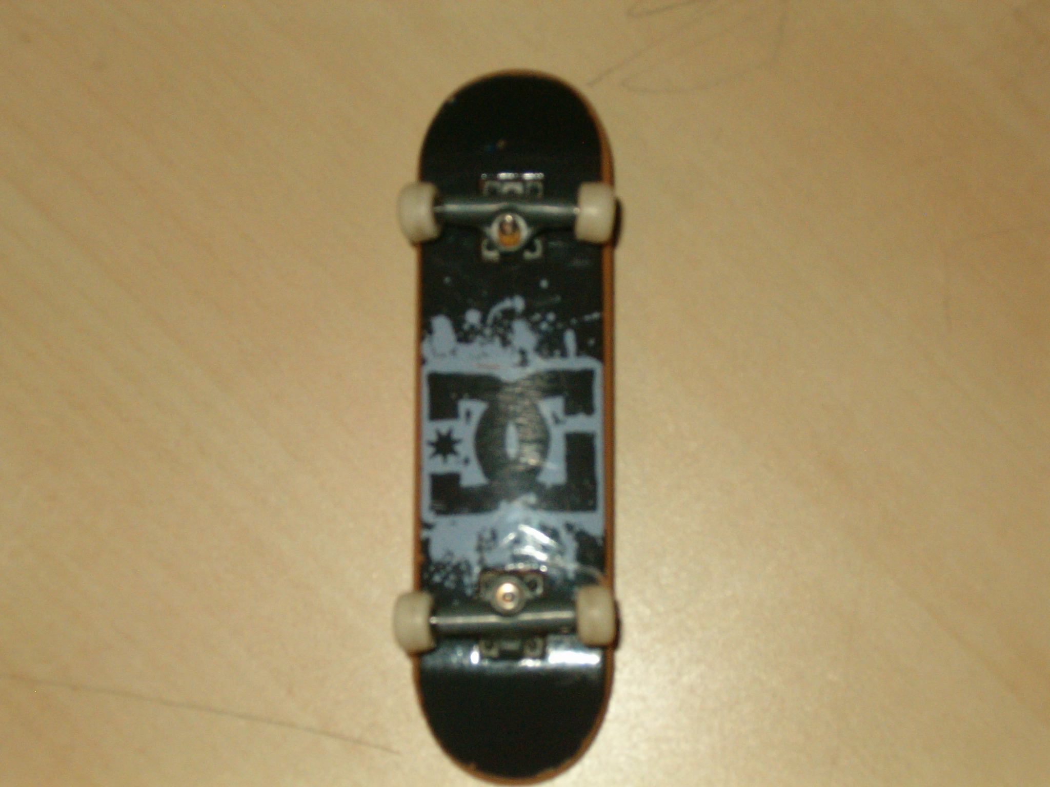 סקייט אצבעות. צילם י.ש. 23:55, 20 אפריל 2006 (IDT)